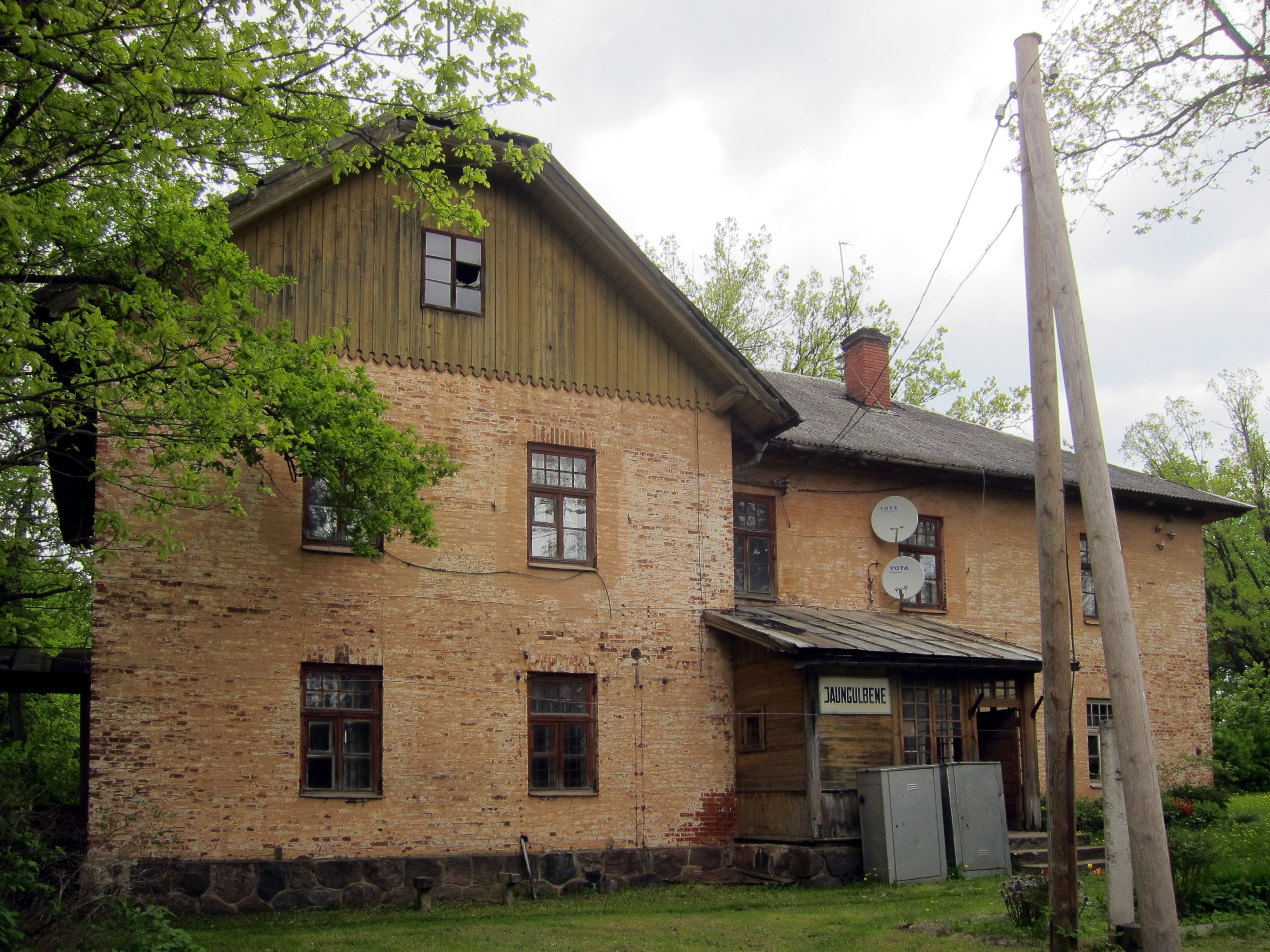 Jaungulbenes stacijas ēka